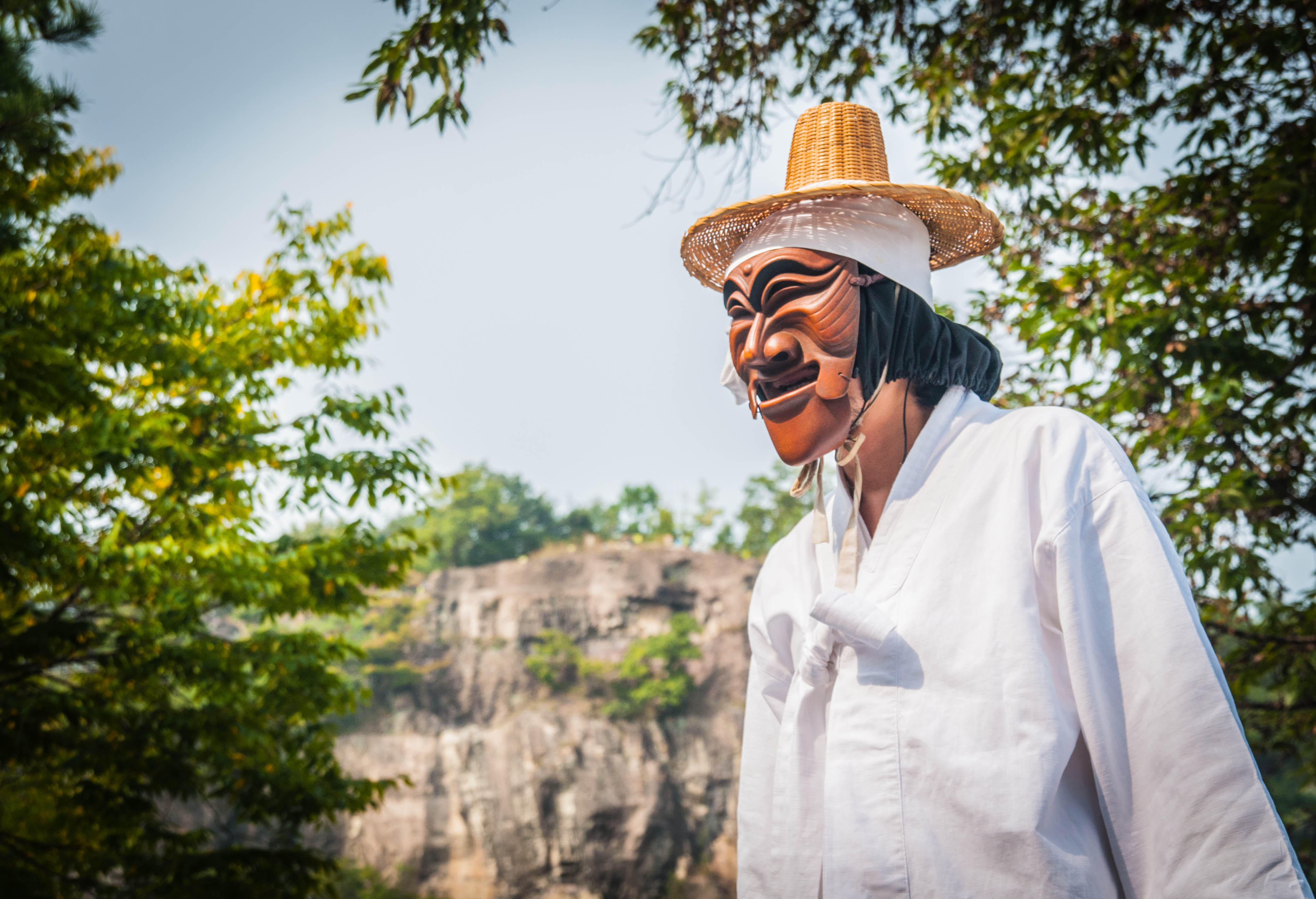 안동 한옥 민속촌에서 촬영한 백정분장을 한 사람의 사진